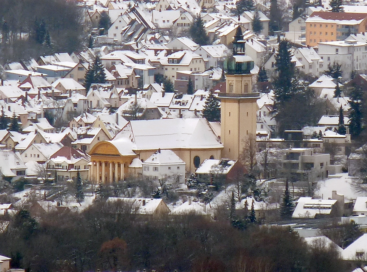 Die Salvatorkirche in Aalen, vom Braunenberg aus